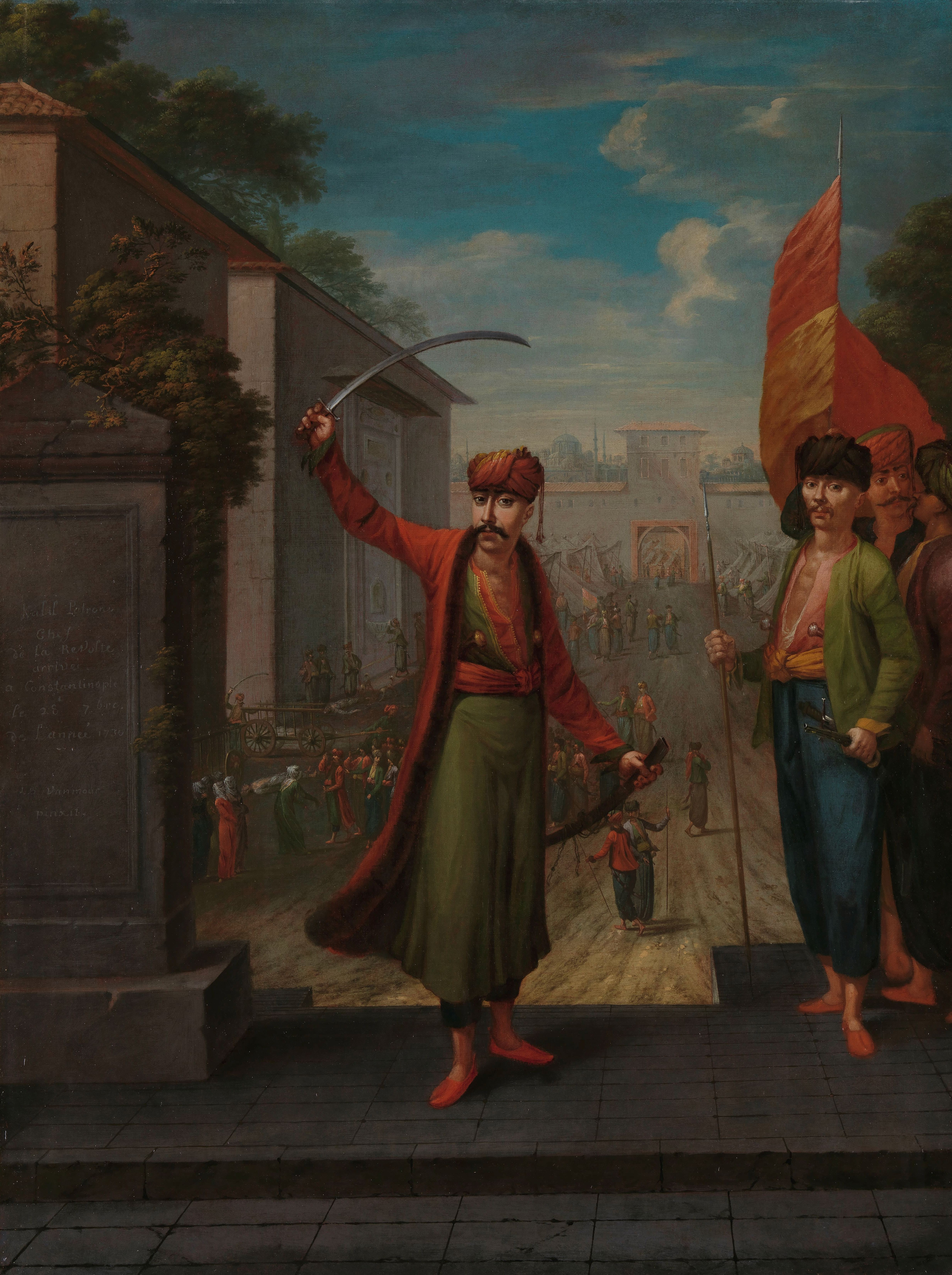 Portret van Patrona Halil, voormalig zeesoldaat, die sultan Ahmed III van de troon stootte en Mahmud I voor hem in de plaats verhief, 28 september 1730. Staande, ten voeten uit, met een opgeheven zwaard in de rechterhand, rechts enkele van zijn volgelingen. Op de achtergrond een gezicht op de eerste binnenplaats van de Serail, waar links de lichamen van de bij de coup omgekomen personen worden weggedragen. Collection: schilderijen; Vanmour serie; Jean Baptiste Vanmour (1671-1737), olieverf op doek, ca. 1730-1737